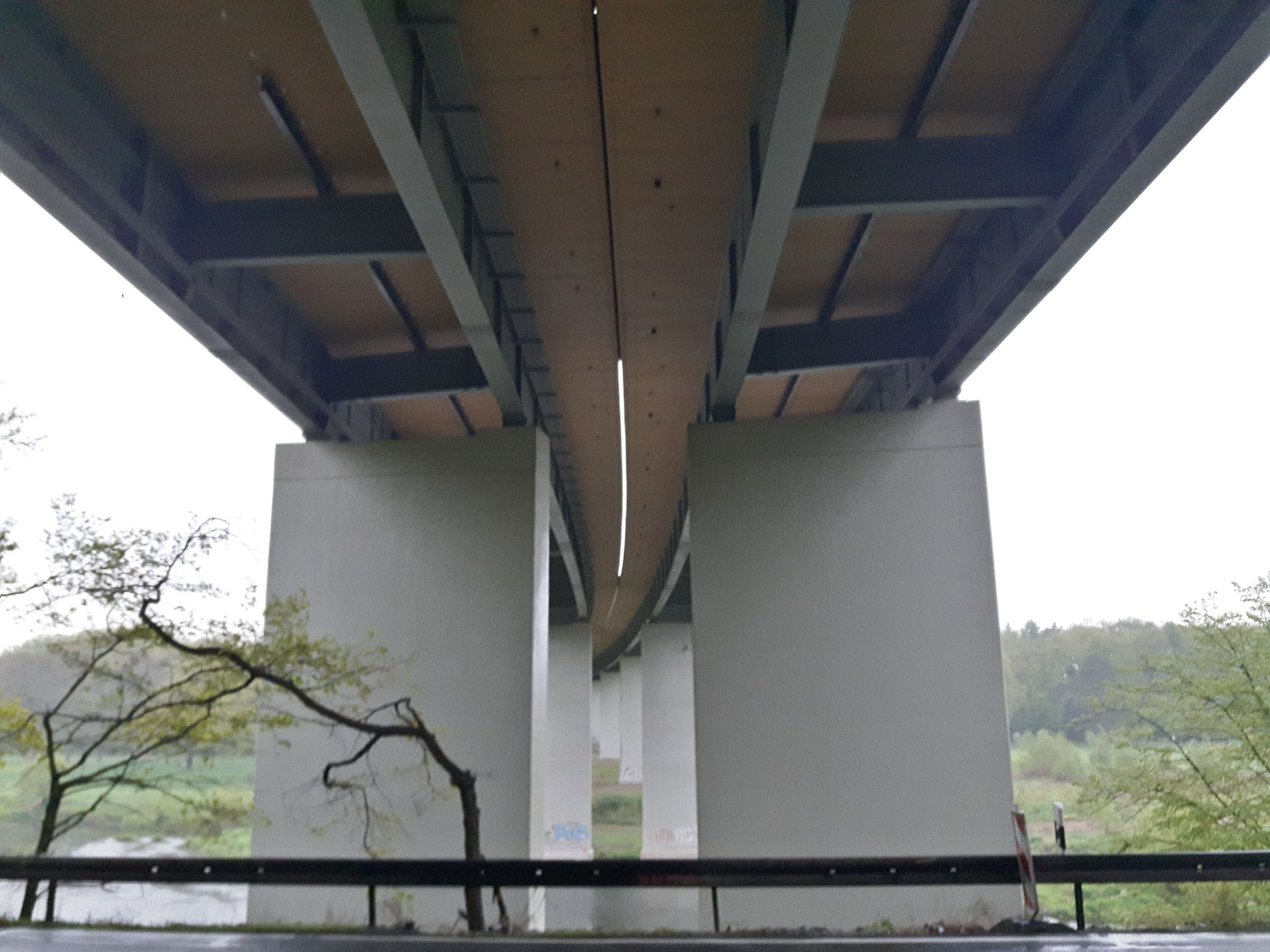 Autobahnbrücke Nerchau A14 Mulde Baujahr 1971 Mittelspalte